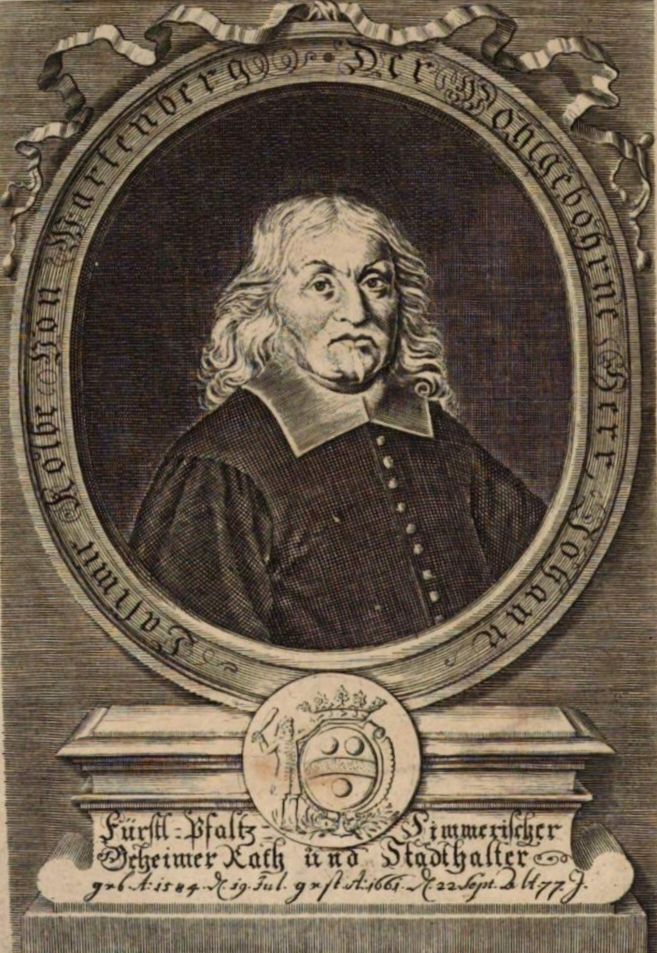 Porträt des Johann Casimir I. Kolb von Wartenberg (1584—1661), Fürstlich pfalz-simmerischer Geheimer Rat und Statthalter.